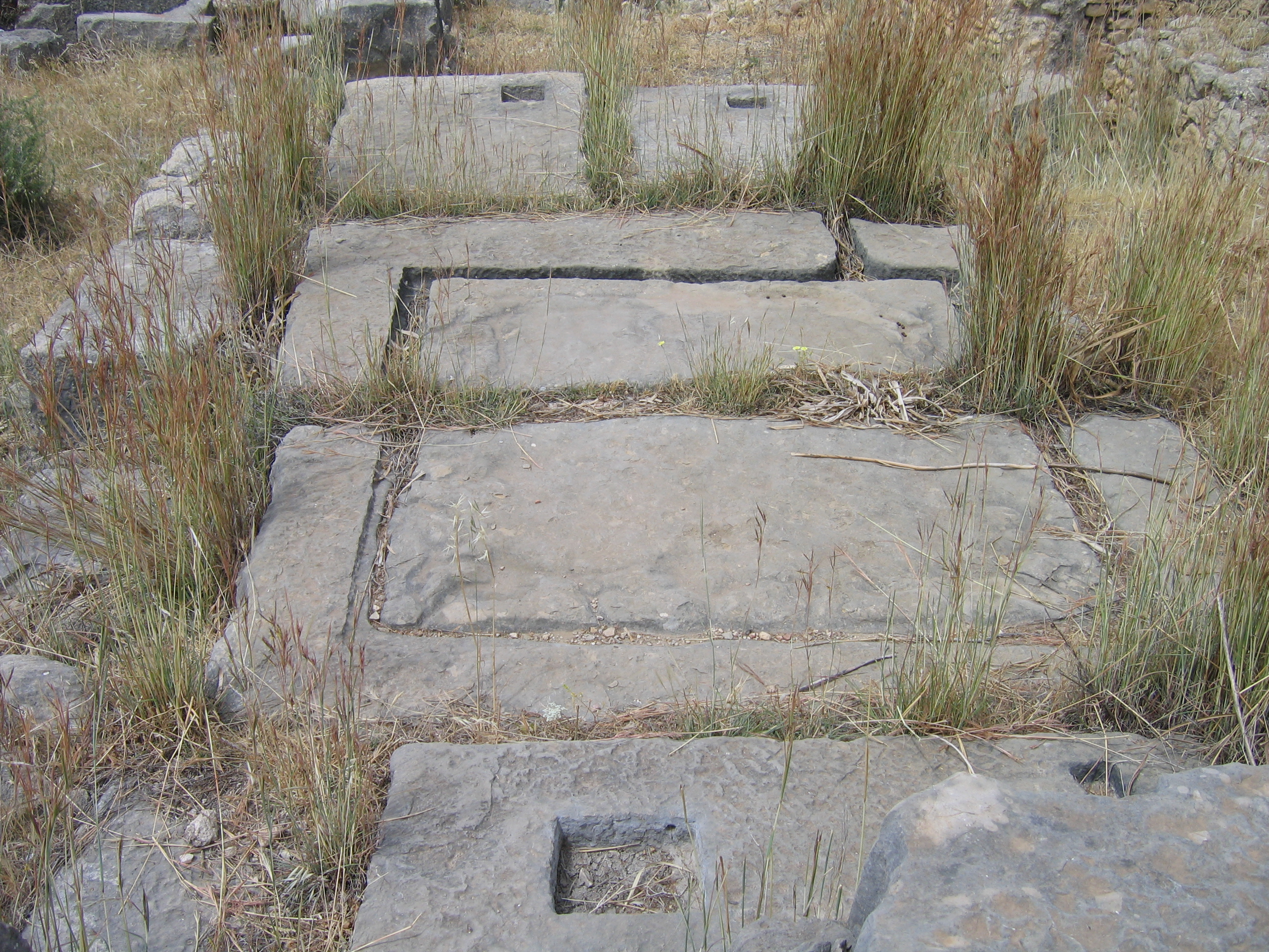 Pressoir à huile antique à Volubilis Maroc